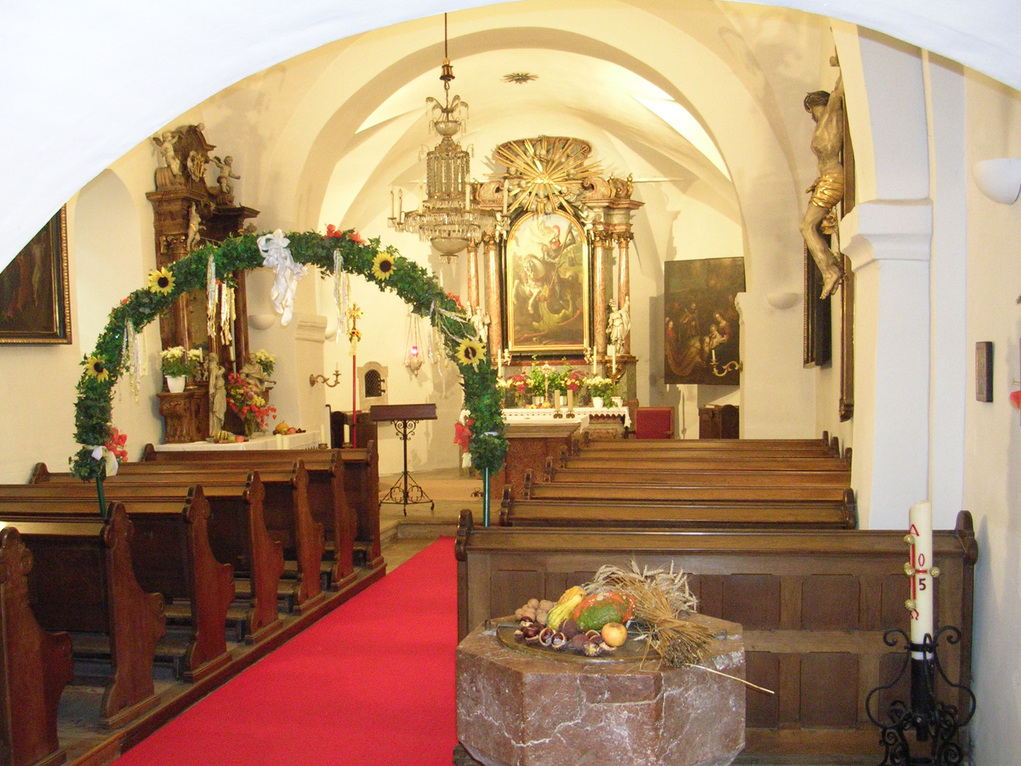 Pfarrkirche Kahlenbergerdorf Innen.jpg